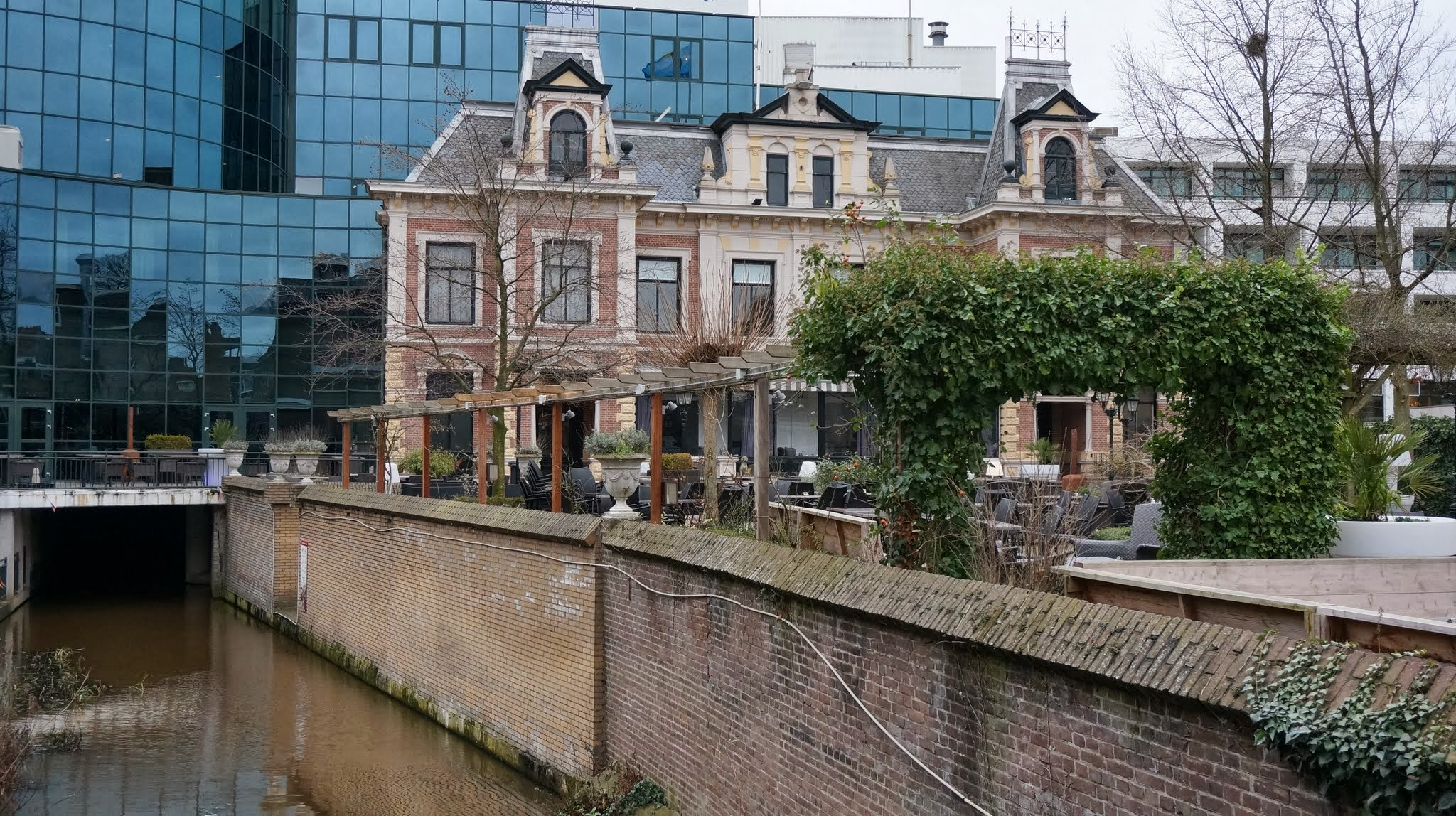 Almelo, Netherlands